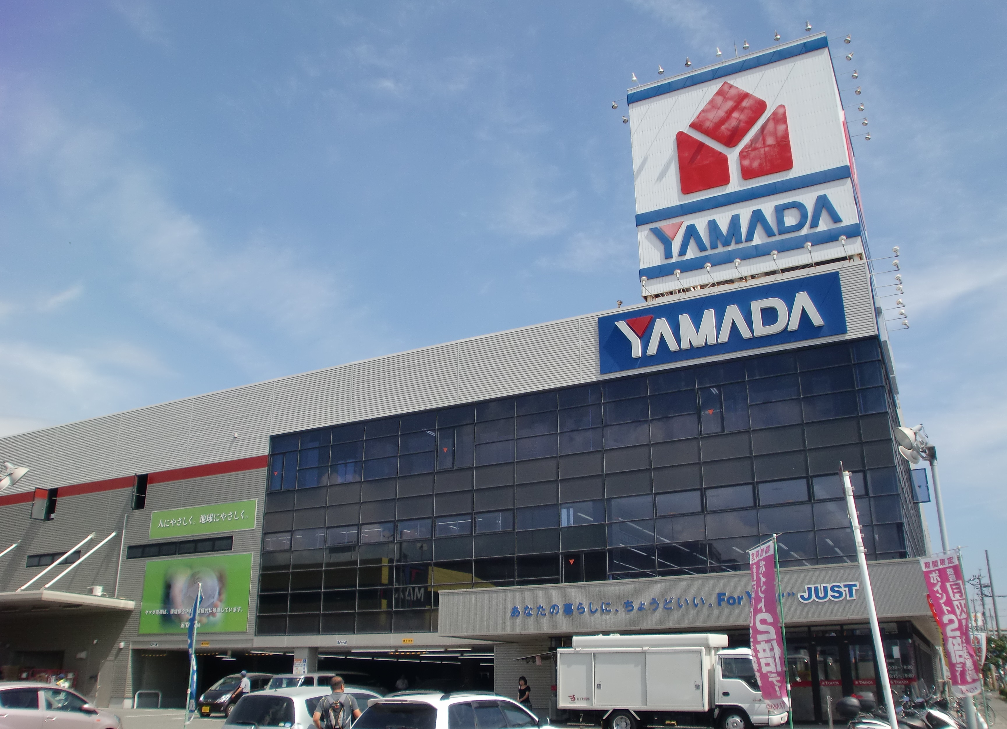 ヤマダ電機の関係会社である南九州ヤマダ電機の本店であるテックランド鹿児島本店の外観。